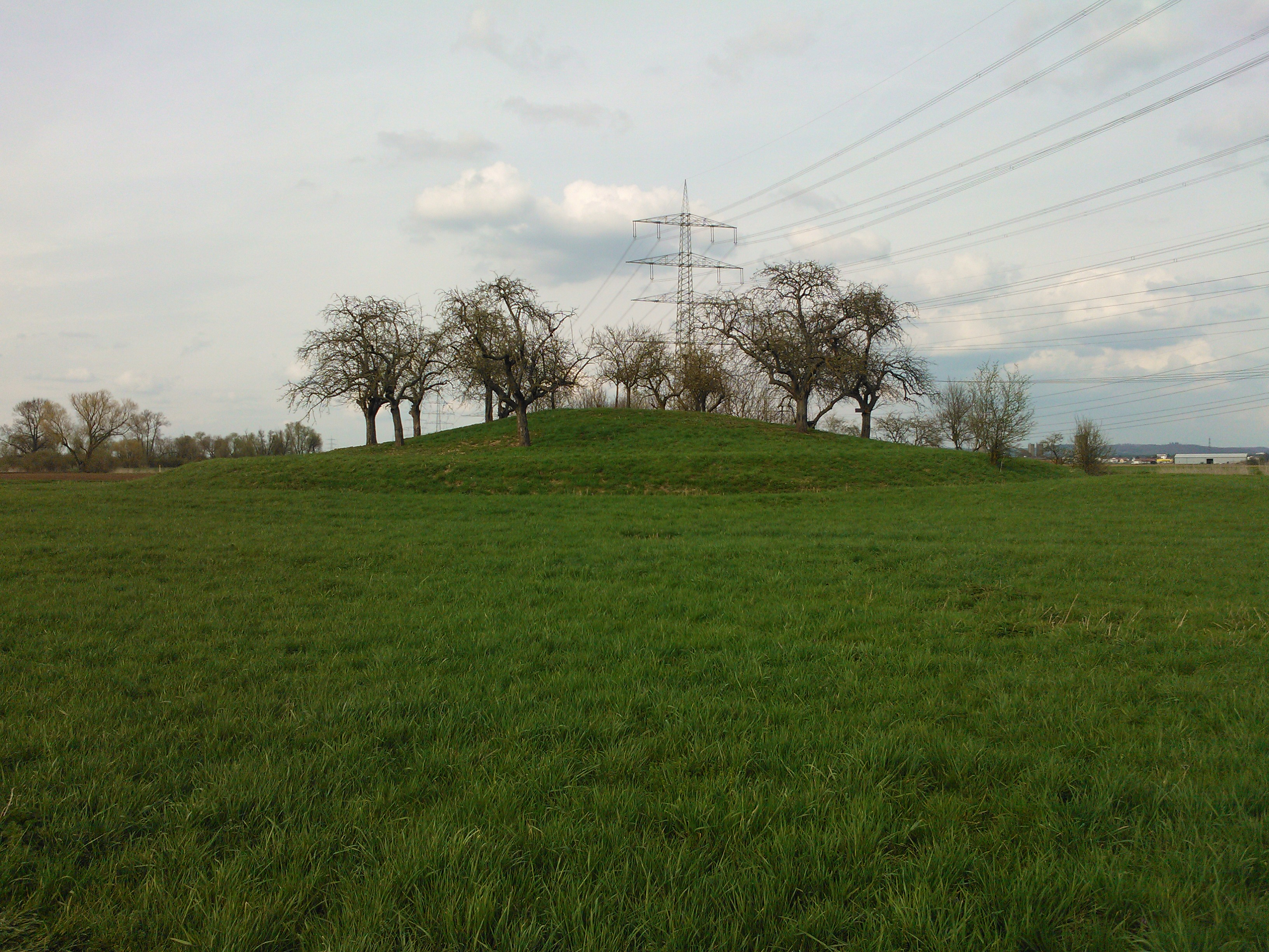 Burgstall der abgegangenen Motte Wellberg südlich von Pfungstadt, Landkreis Darmstadt-Dieburg, Hessen. Aufnahme aus Süden